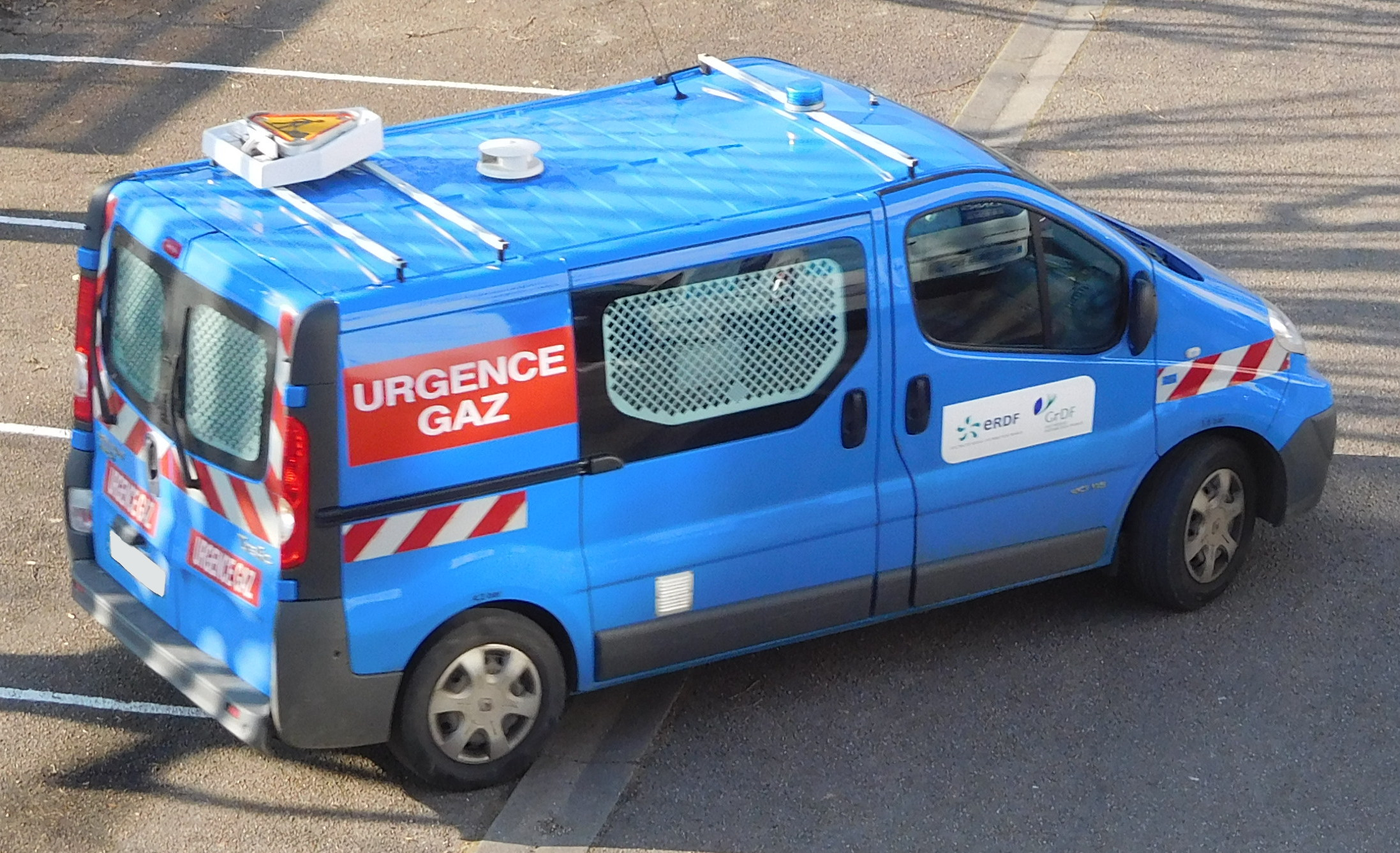 Renault Trafic II dCi 115 « Urgence gaz » de Gaz Réseau Distribution France (GRDF).